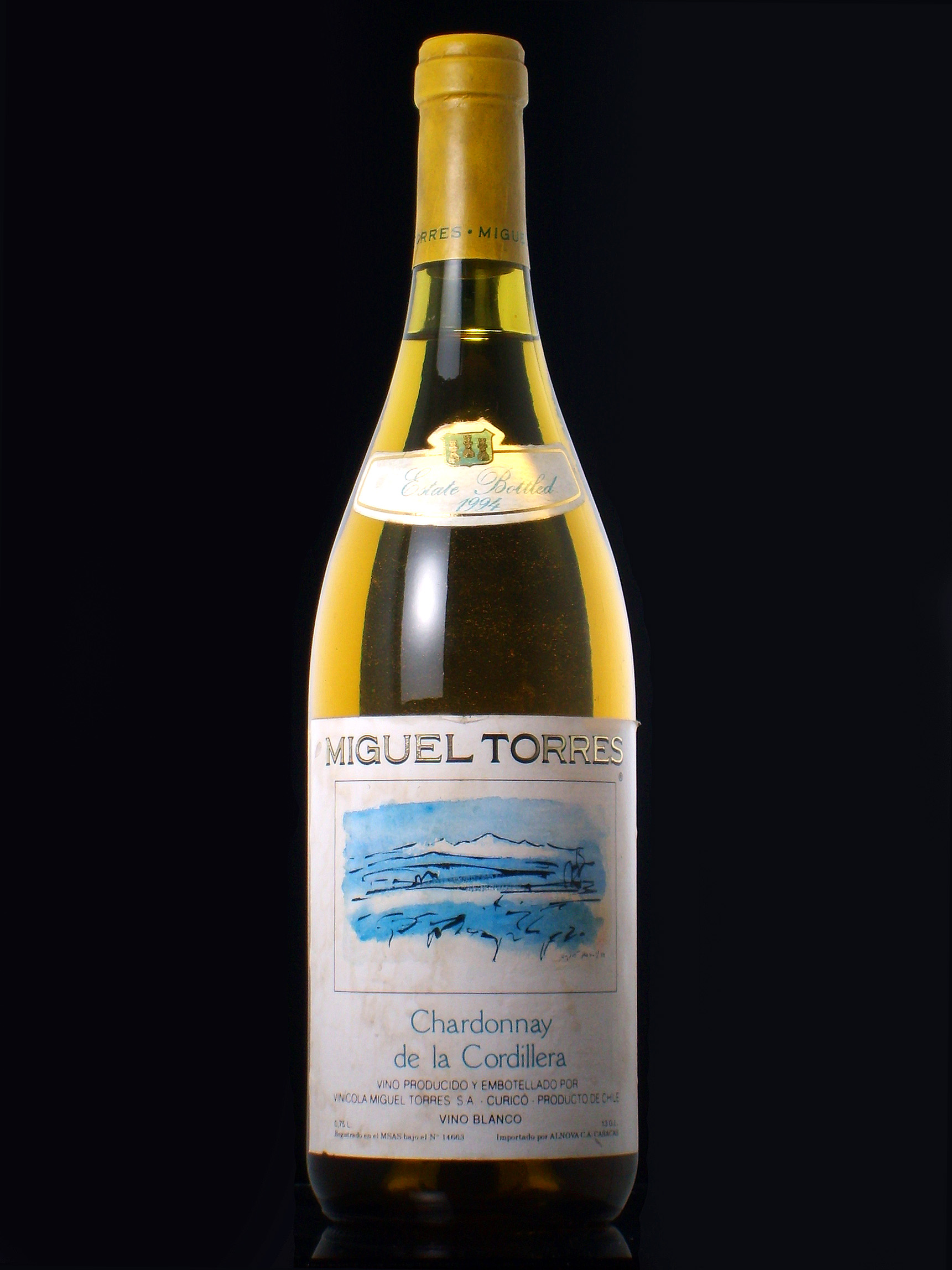 Botella de vino Miguel Torres, tipo Chardonnay, año 1994. Producido y embotellado por Vitivinícola Miguel Torres en Curicó, Chile.